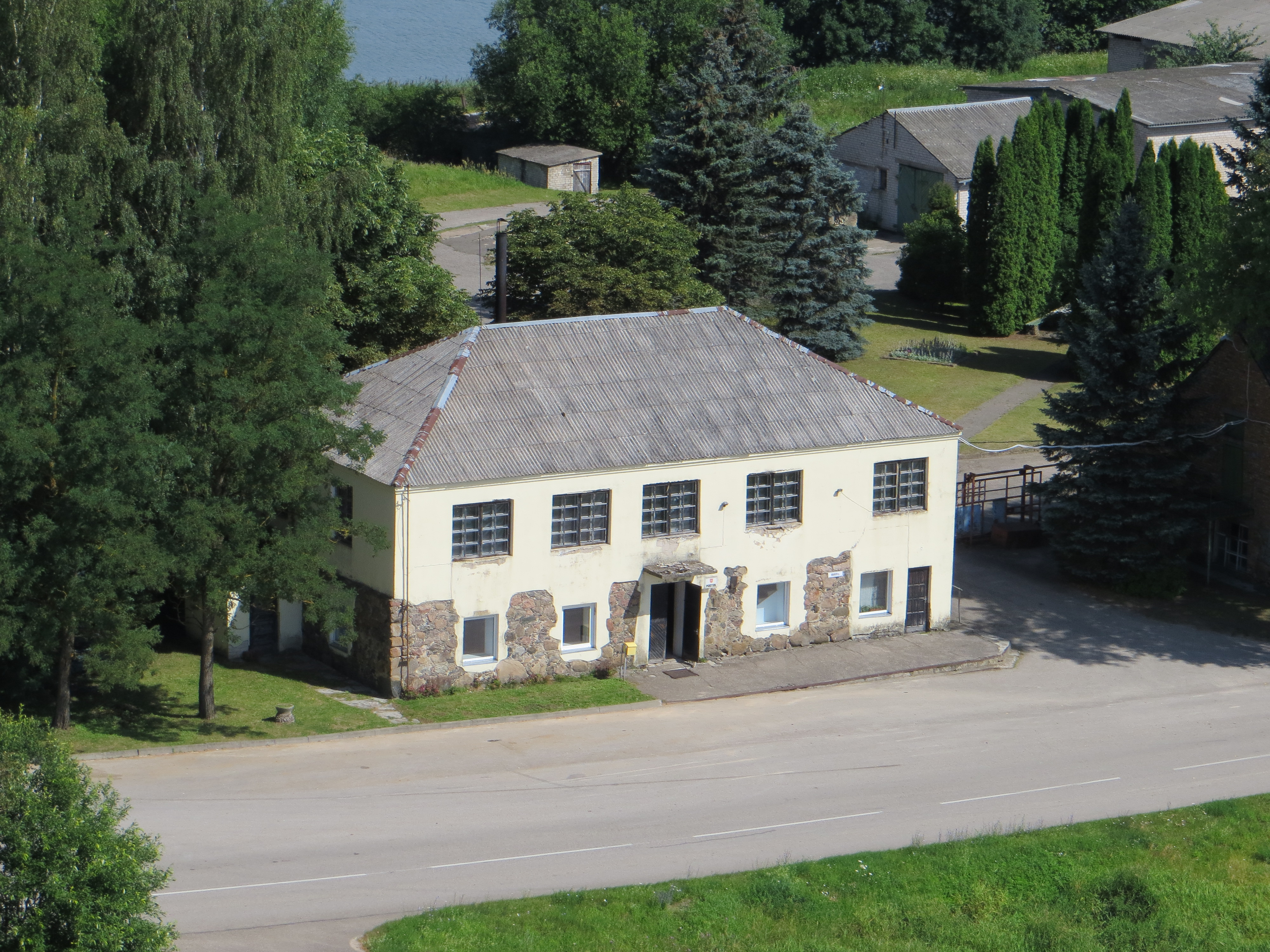 Ambraziškiai, Lithuania